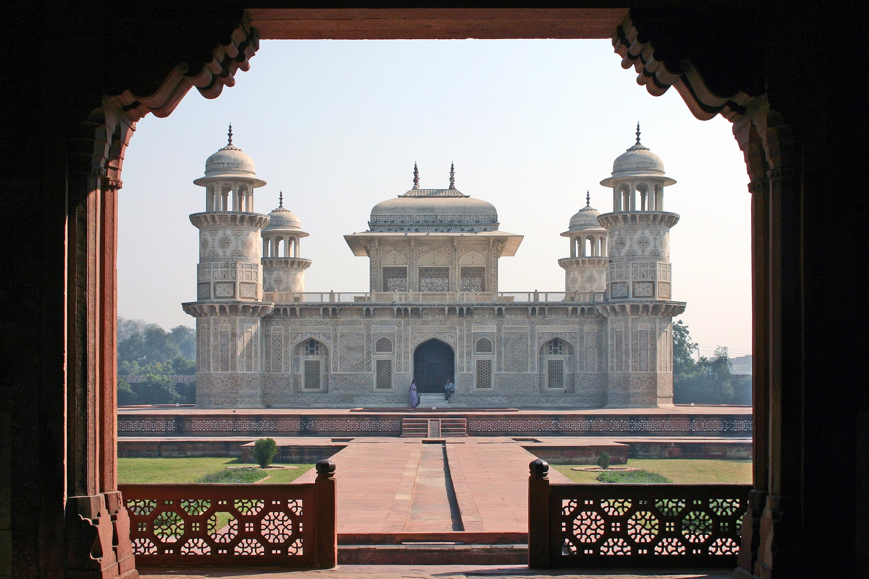 Mausoleum des Itimad-ud-Daula, erbaut 1622-1628, in Agra / Indien